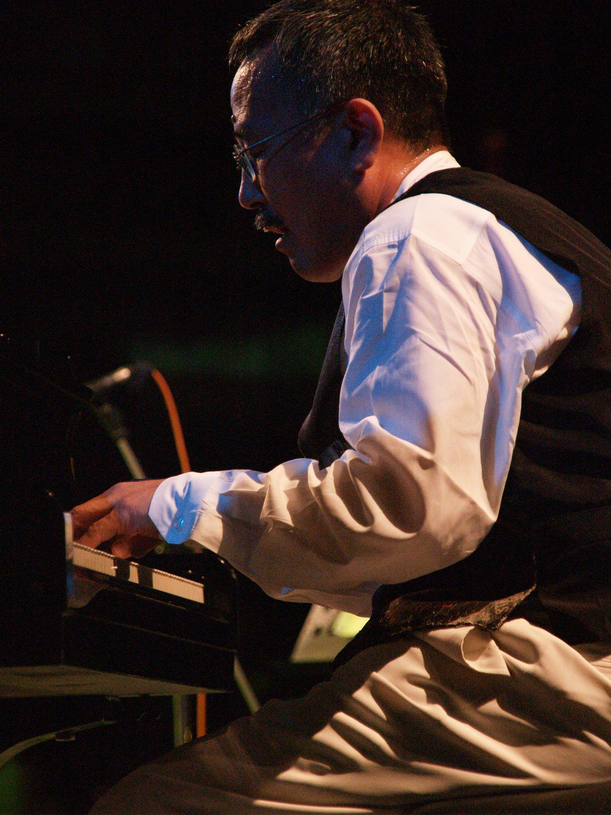 Yosuke Yamashita